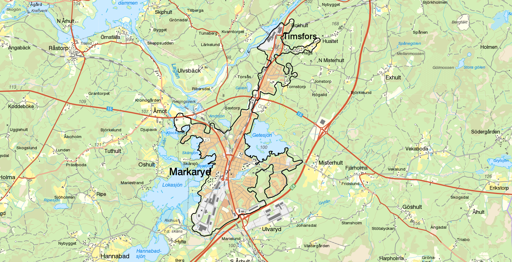 Tätorten Markaryd med gränserna från Statistiska centralbyråns tätortsavgränsning 2015 i svart. Bakgrundskarta från Lantmäteriet, skala 1:30 236.